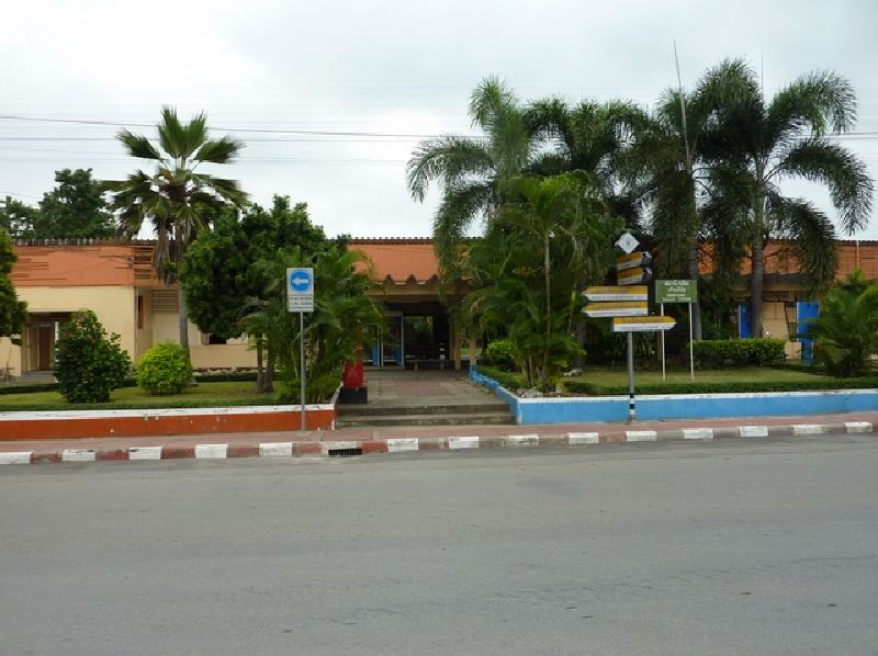 สถานีรถไฟบ้านโป่ง